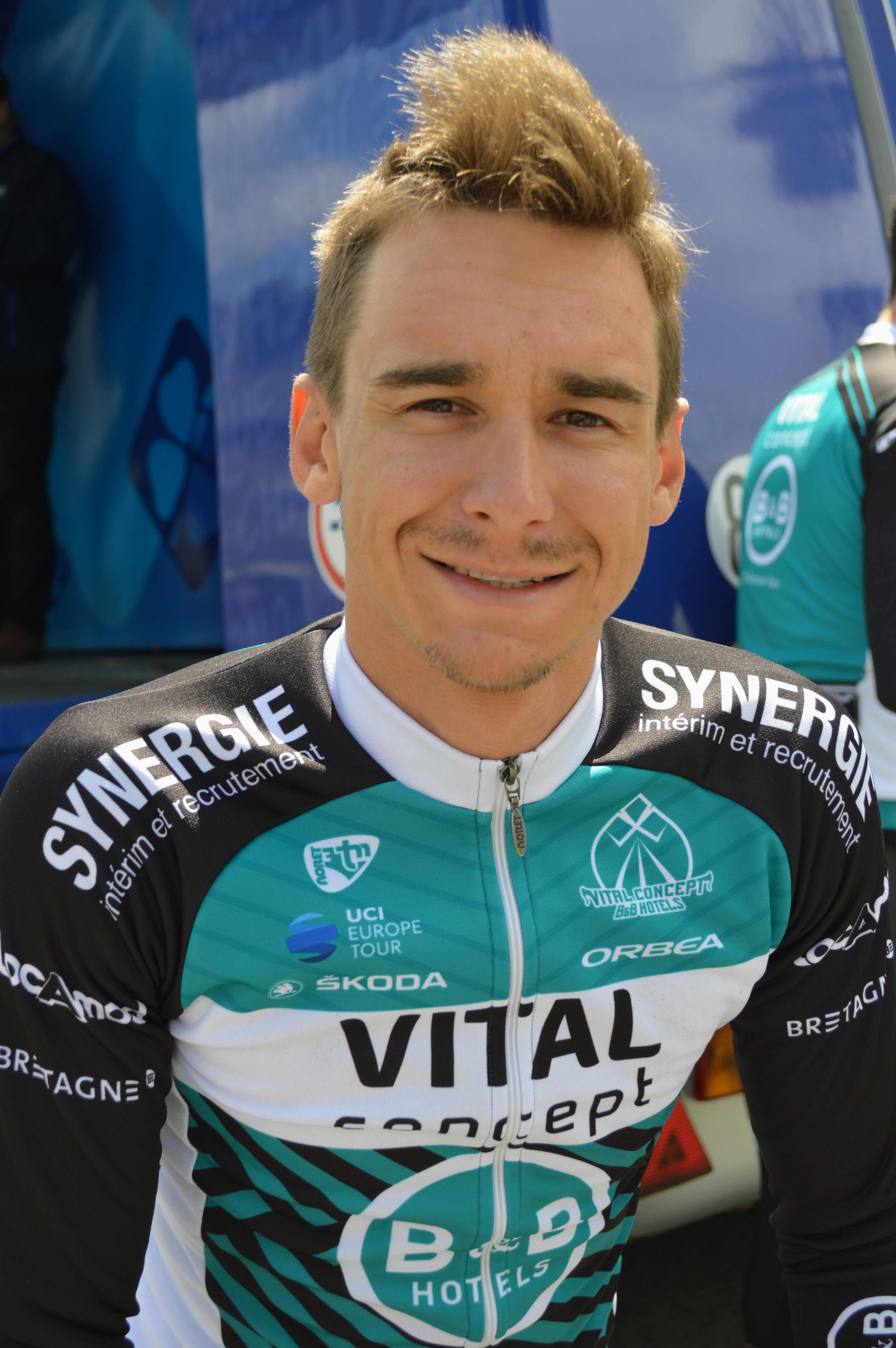 Bryan COQUARD - Juin 2019